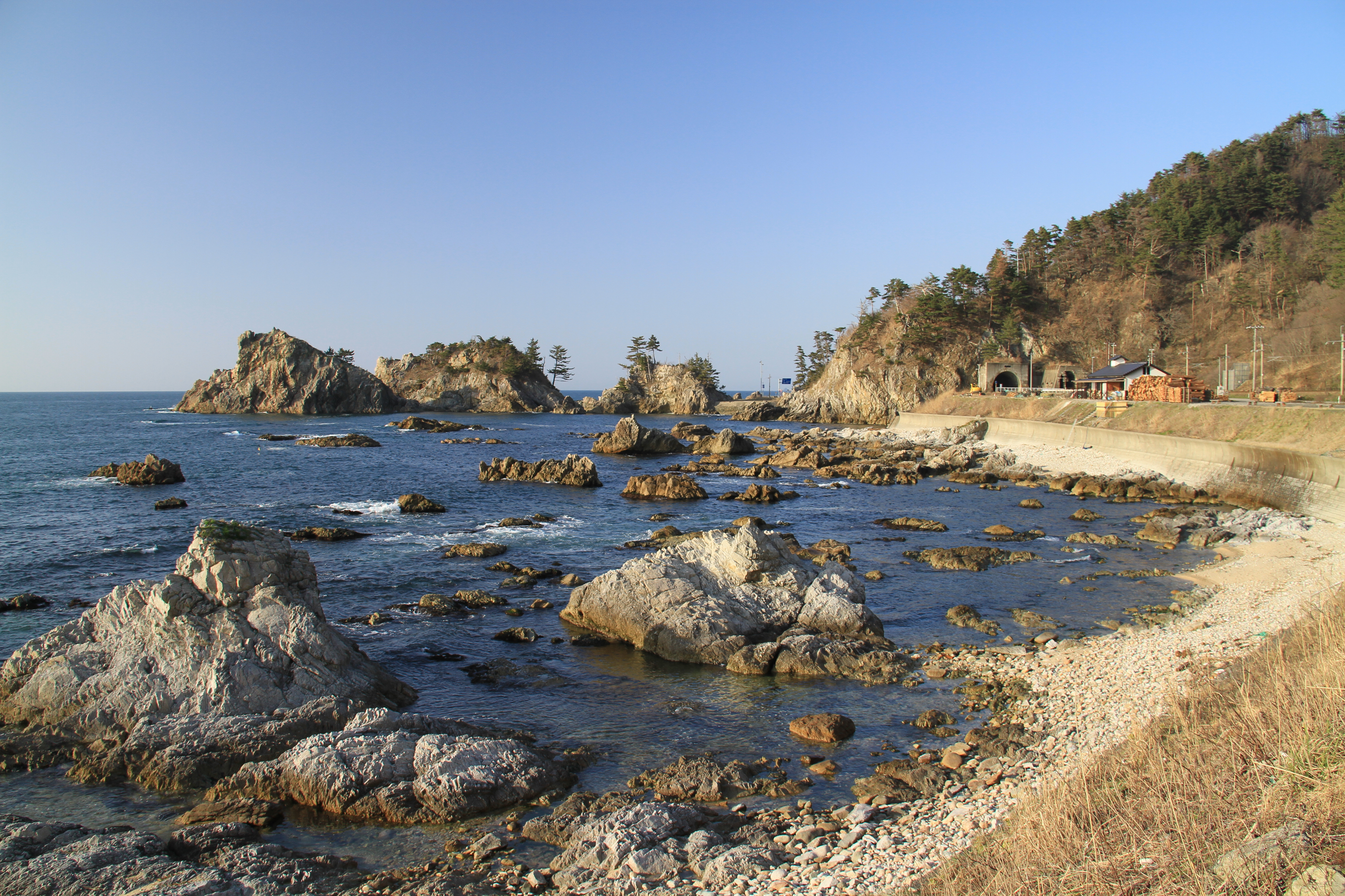 Wakigawa, Murakami, Niigata Prefecture 959-3661, Japan